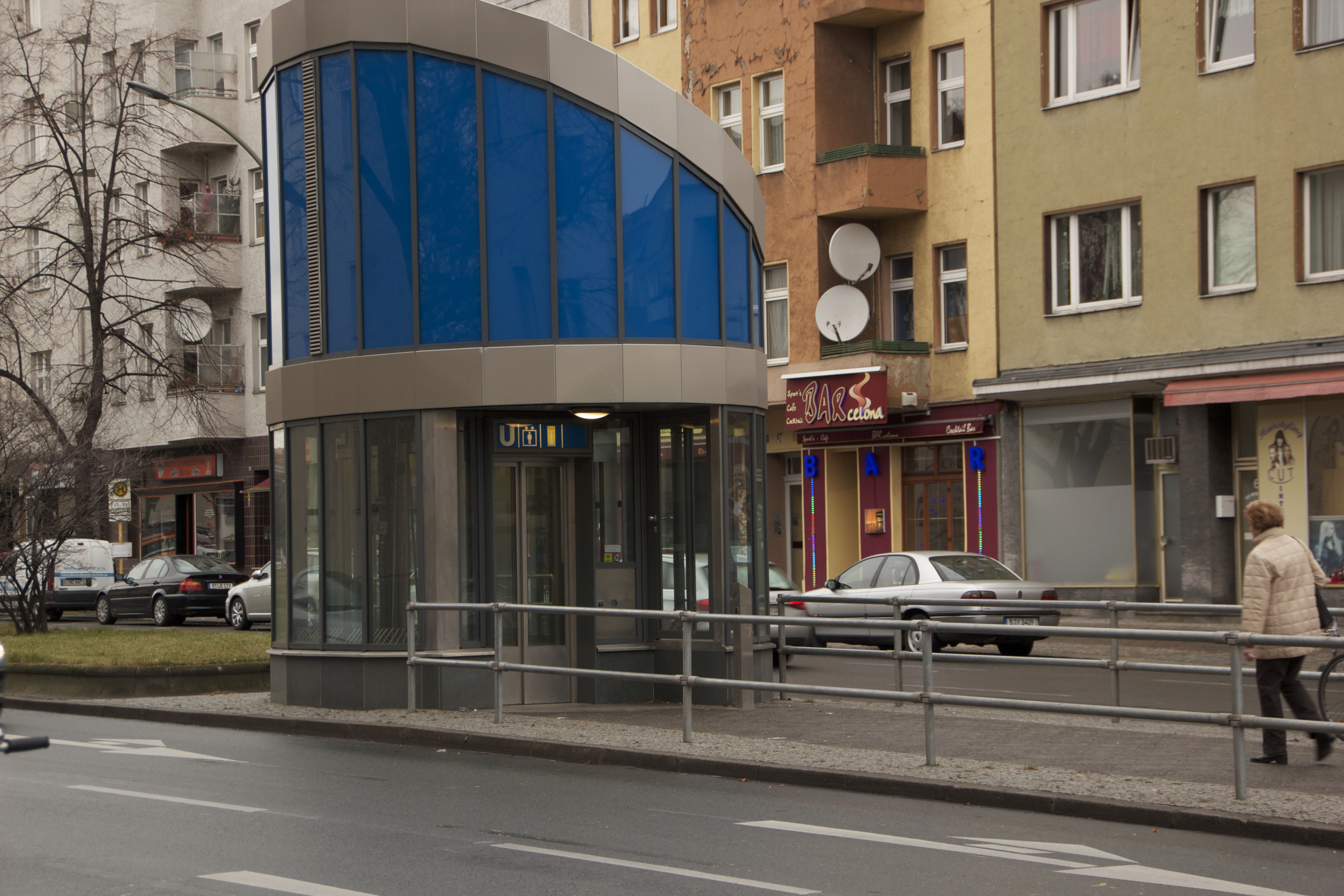 U-Bahnhof Rehberge, Berlin, neuer Fahrstuhl